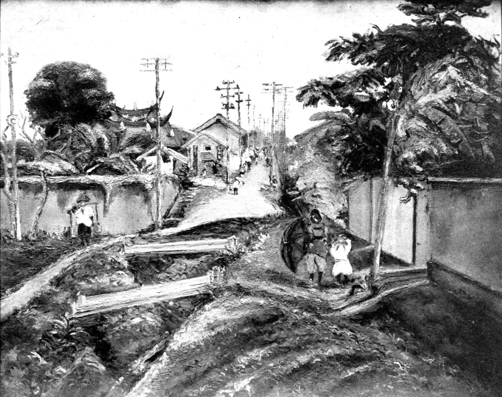 嘉義の町中/ 陳澄波/ 1926年/ 畫布、油彩。入選1926年第七回日本帝國美術展，原作已佚失，現存黑白照片。